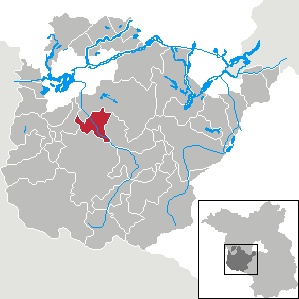 Golzow in Brandenburg (Country) - District Potsdam-Mittelmark